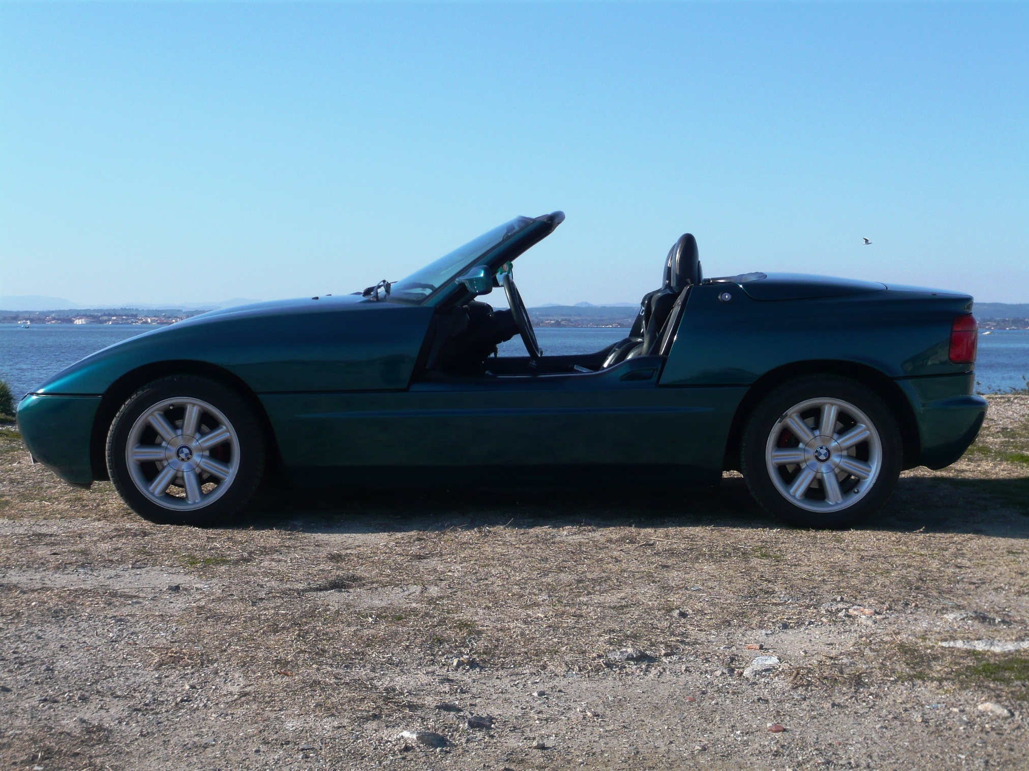 BMW Z1 vert 1989 (profil)